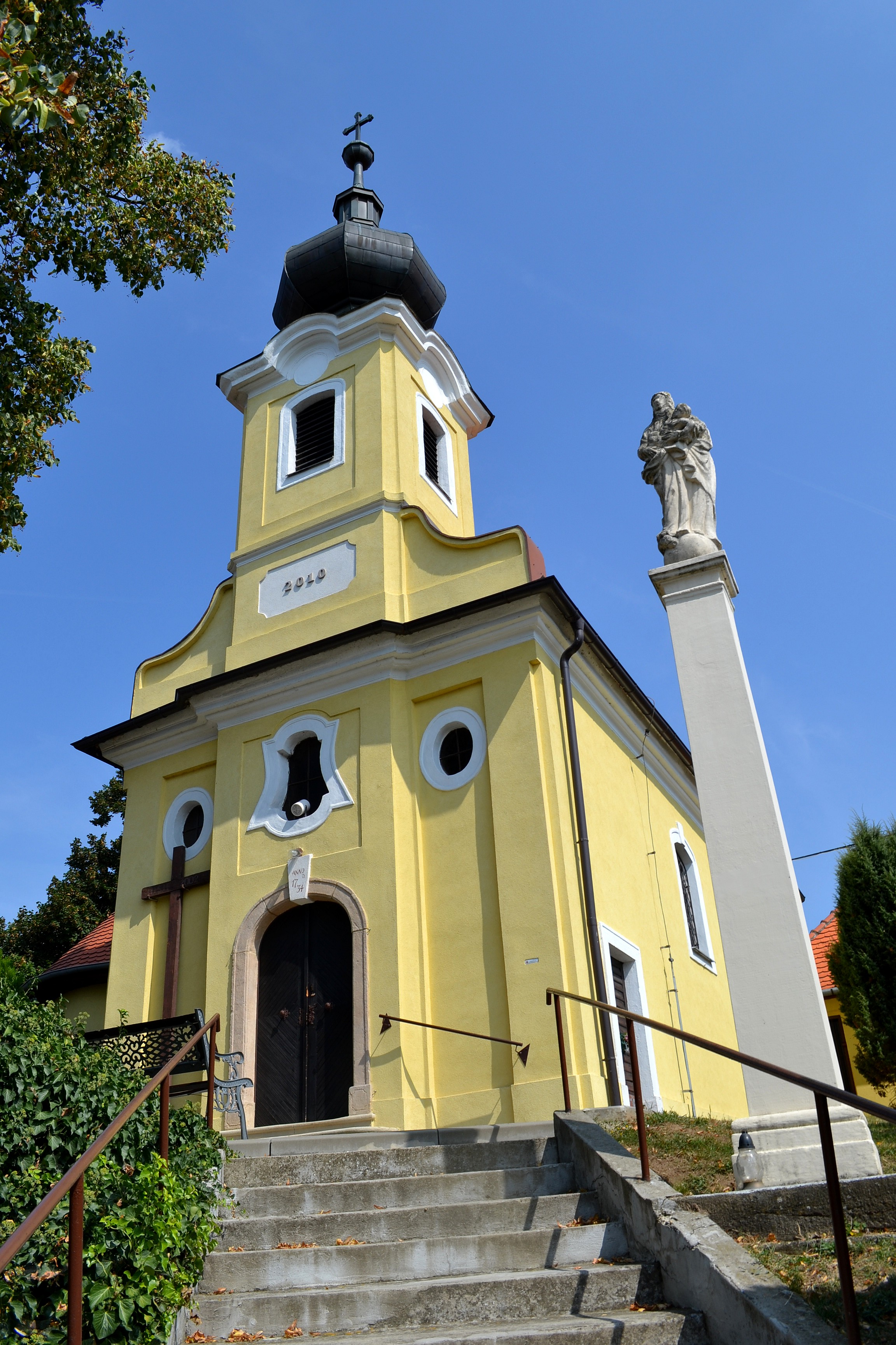 Koplotovce (okr. Hlohovec), Kostol Navštívenia Panny Márie; priečelie kostola